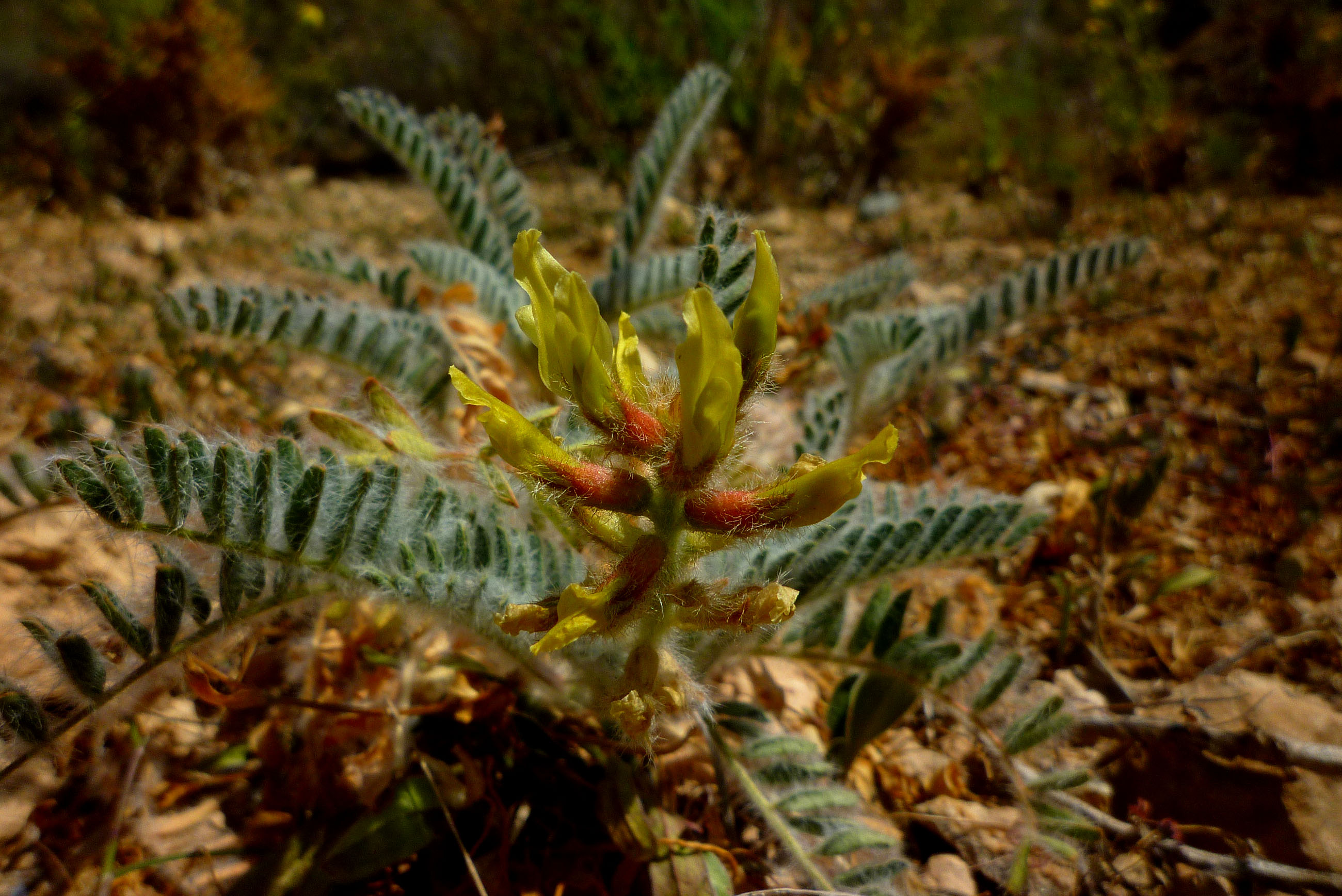 Astragalus nitidiflorus (Garbancillo de Tallante) en el Parque Natural de la Sierra de la Muela, Cabo Tiñoso y Roldán de Cartagena.